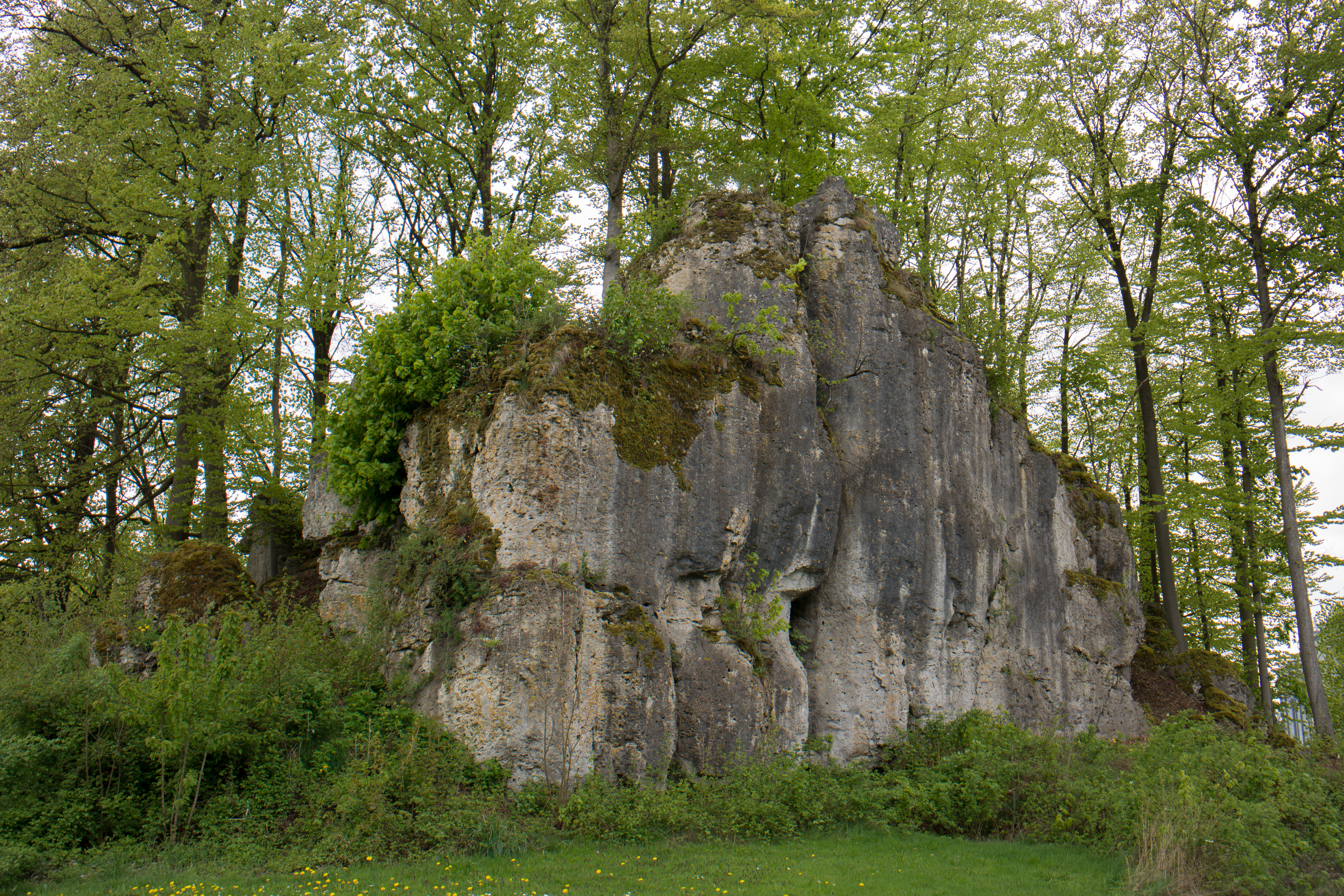 Geotop Druidenstein (474R034) in Hiltpoltstein, Naturdenkmal ND-04511